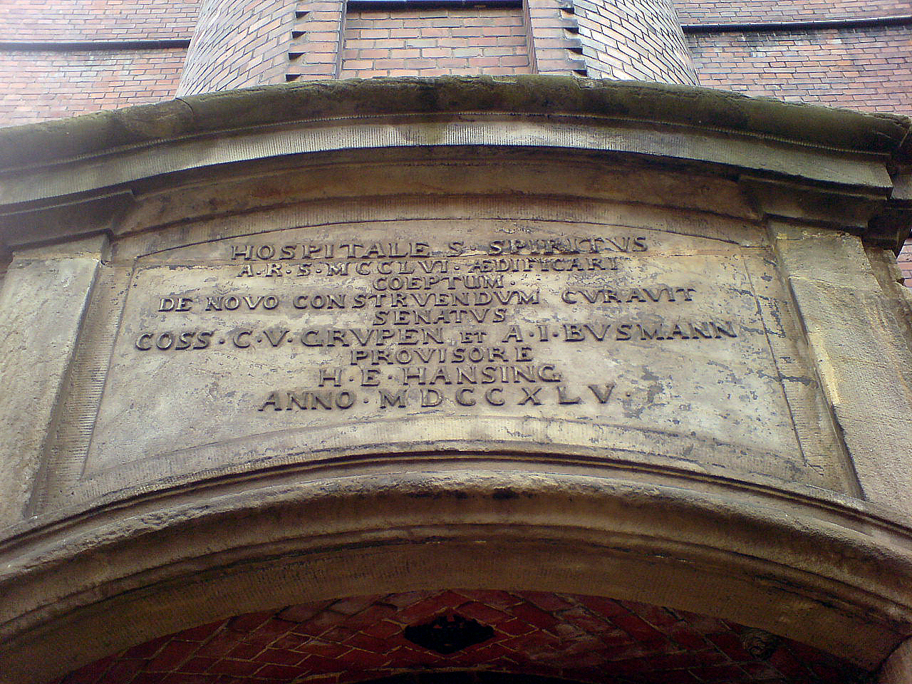 Die lateinische Inschrift über dem Garteneingangs-Portal des mittleren Flügels vom Stift zum Heiligen Geist in Hannover lautet: HOSPITALE S[ancti] SPIRITVS A[nno] R[eparatae] S[alvtis] MCCLVI AEDIFICARI COEPTVM DE NOVO CONSTRVENDVM CVRAVIT SENATVS CO[n]S[vlibv]S C[hristiano] V[lrico] GRVPEN ET A[ntonio] I[vlio] BVSMANN PROVISORE H E HANSING ANNO MDCCXLV – „Das Hospital zum Heiligen Geist, das im Jahr des wiederhergestellten Heils 1256 anfänglich errichtet wurde, ließ der Stadtrat von Neuem erbauen unter den Bürgermeistern Christian Ulrich Grupen und Anton Julius Busmann und dem Bauleiter H. E. Hansing im Jahr 1745.“